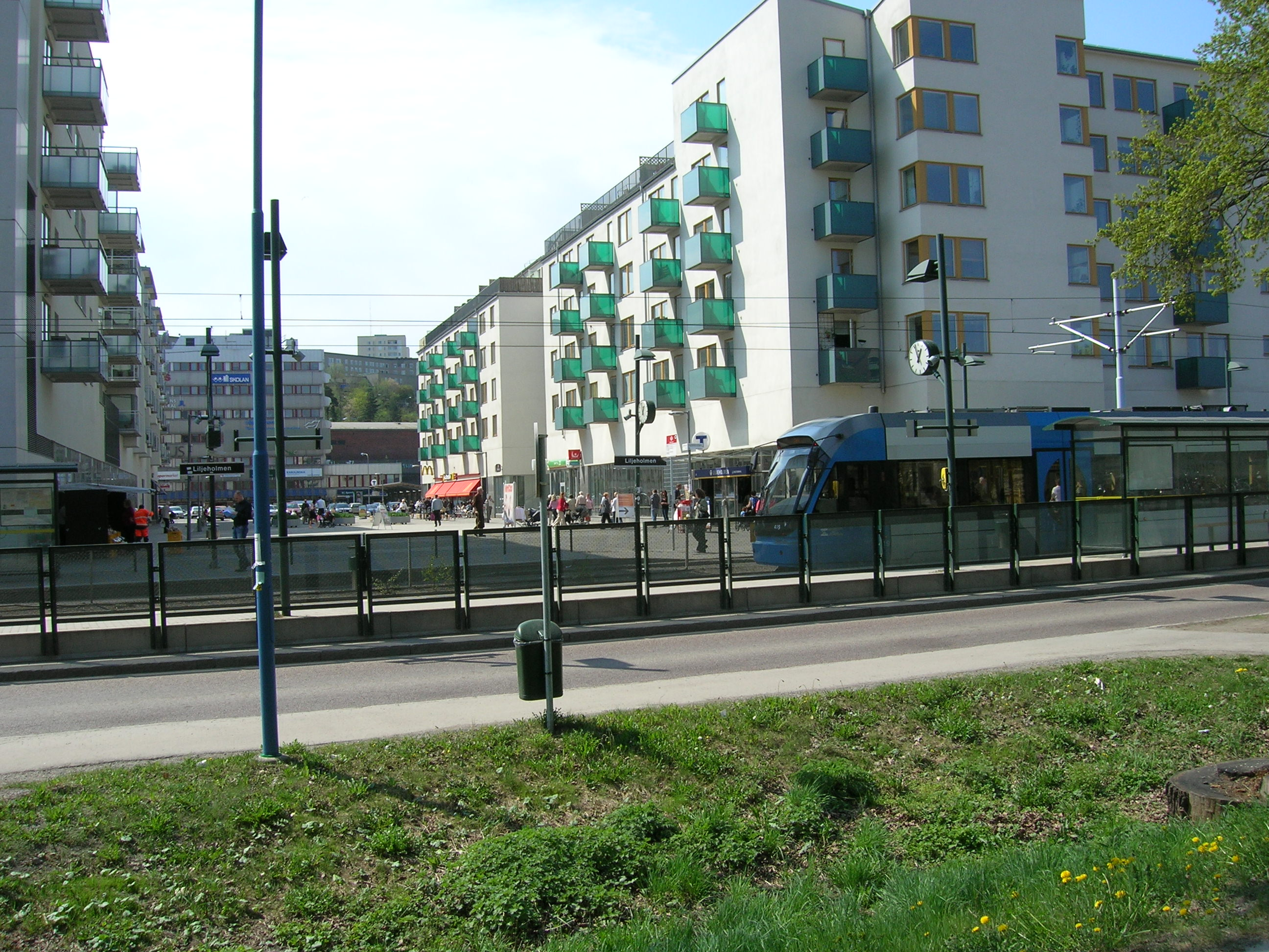 Liljeholmen maj 2006. I förgrunden tvärbanans hållplats, bakom den tunnelbanestationen och Liljeholmstorget. Fotograf: Niklas Nordblad